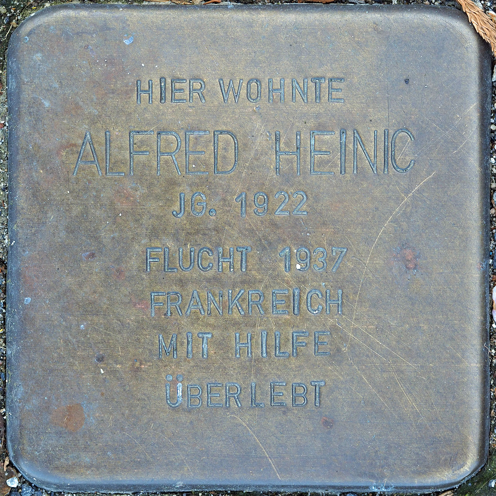 Stolpersteine MG: Heinic, Alfred